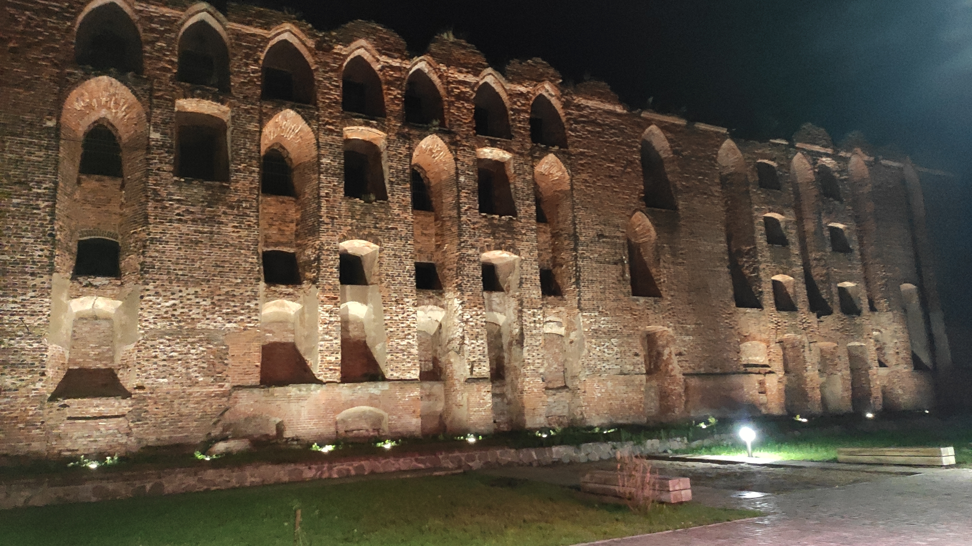 нынешнее состояние